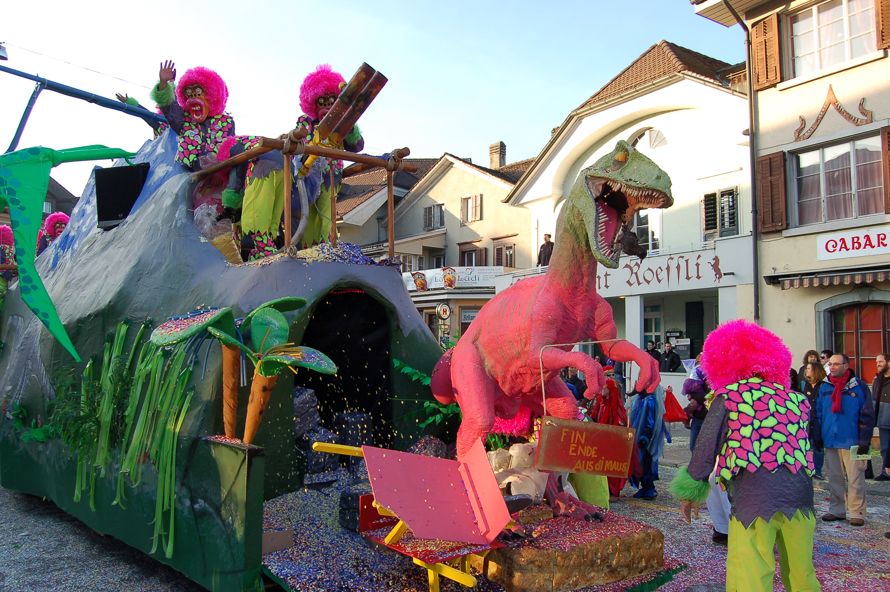 Umzug Fasnacht 2008 in der Vorstadt von Solothurn, Schweiz